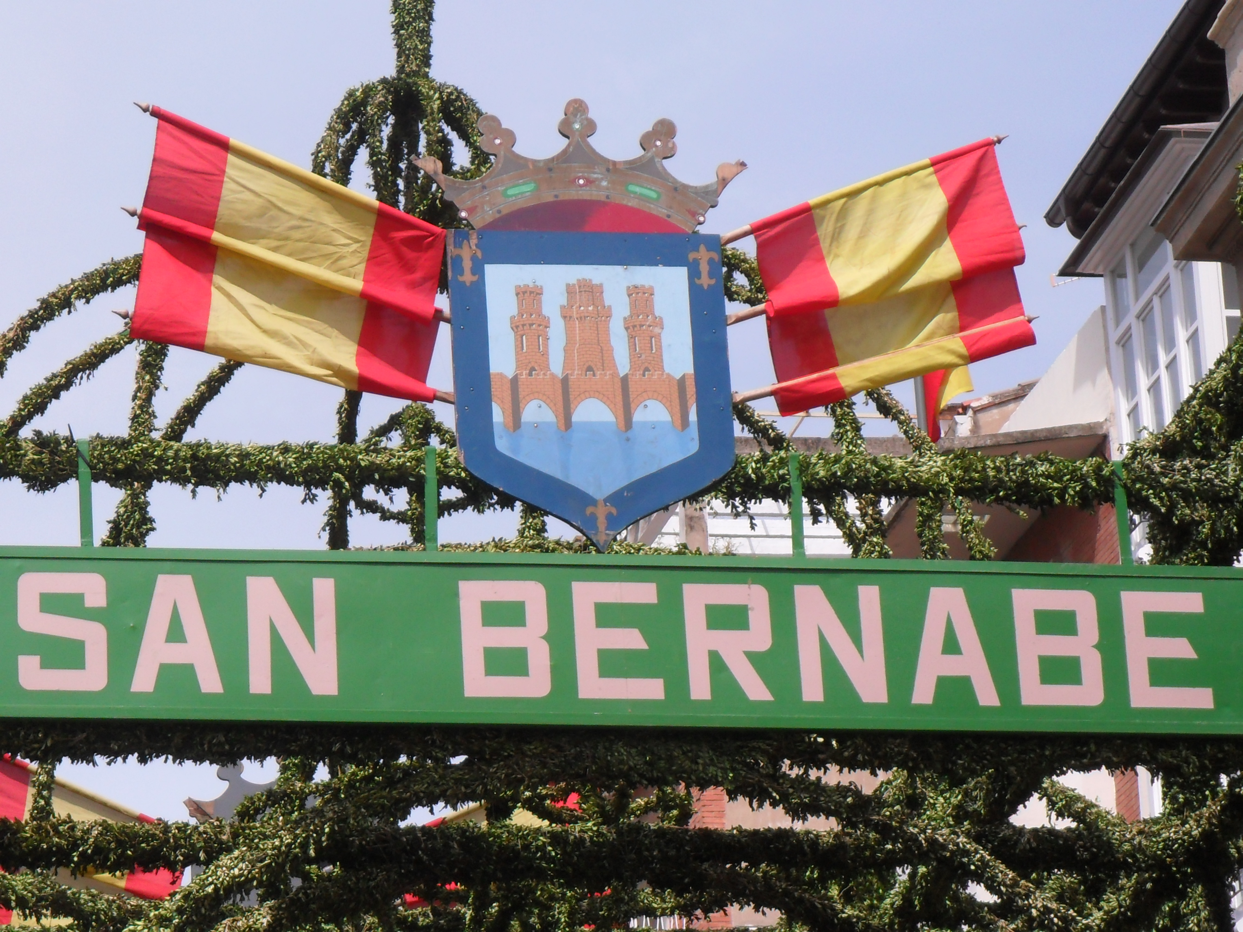 Detalle del Arco de San Bernabé. Logroño